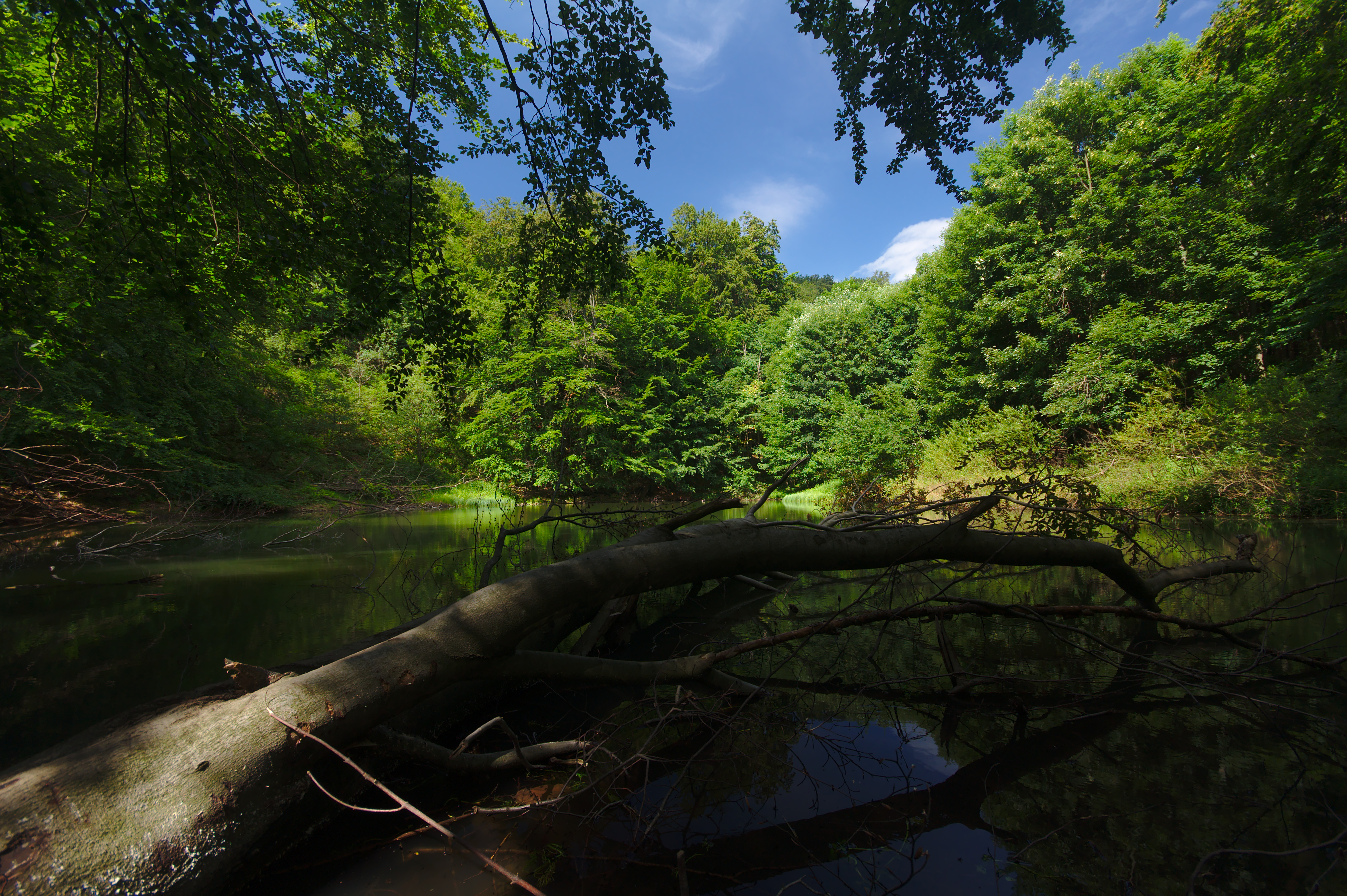 Prírodná pamiatka Malé Morské oko - jazero, CHKO Vihorlat